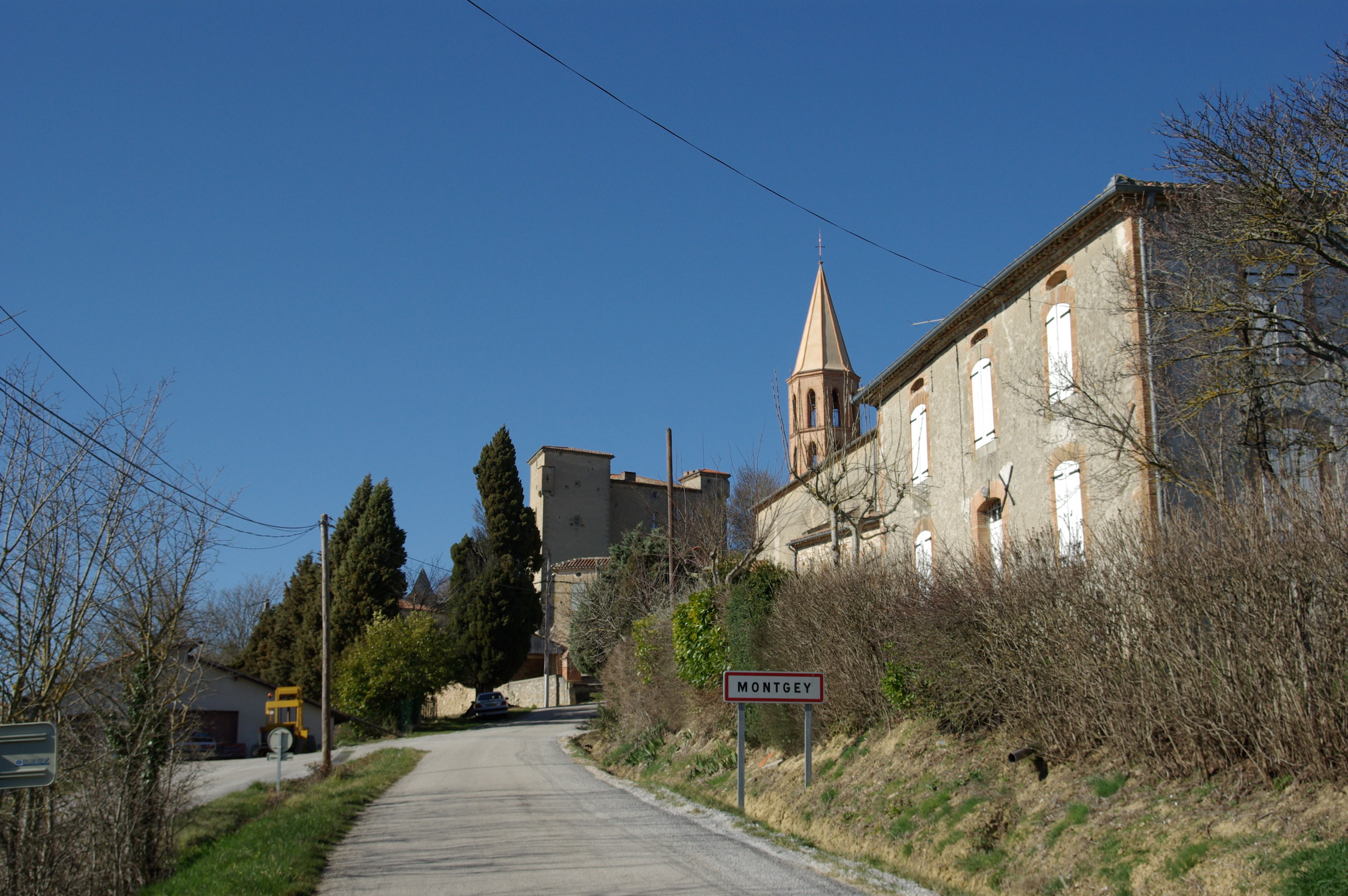 France, Tarn (81), Montgey, entrée du village de Montgey